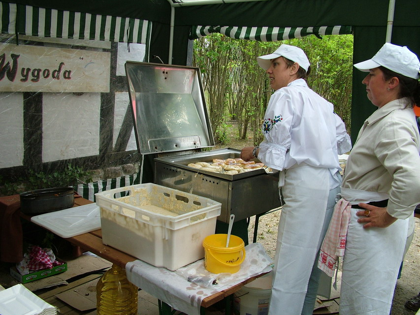 Kaszubski Park Etnograficzny we Wdzydzach Kiszewskich - pieczenie ruchanek